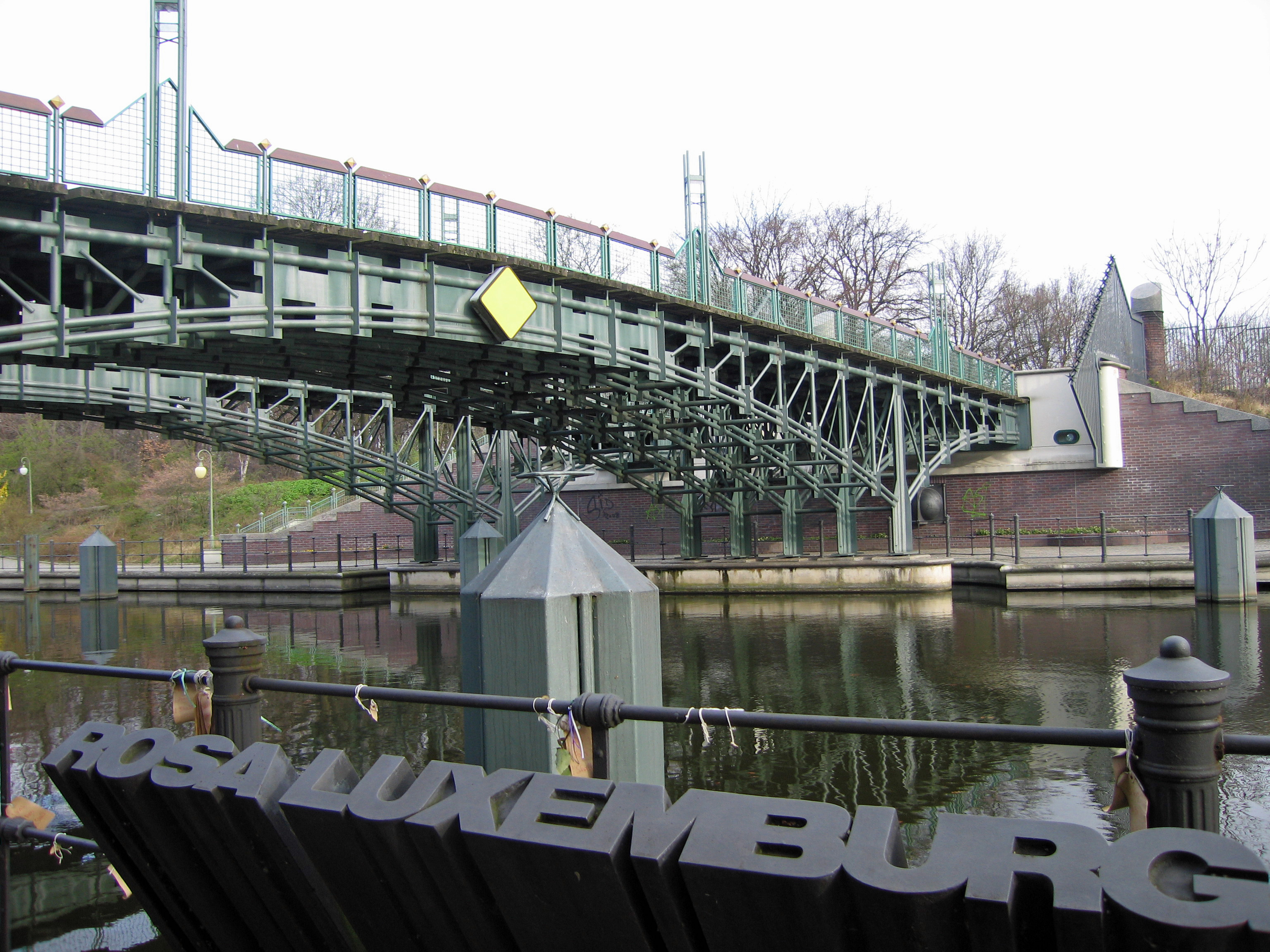 Rosa_Luxemburg